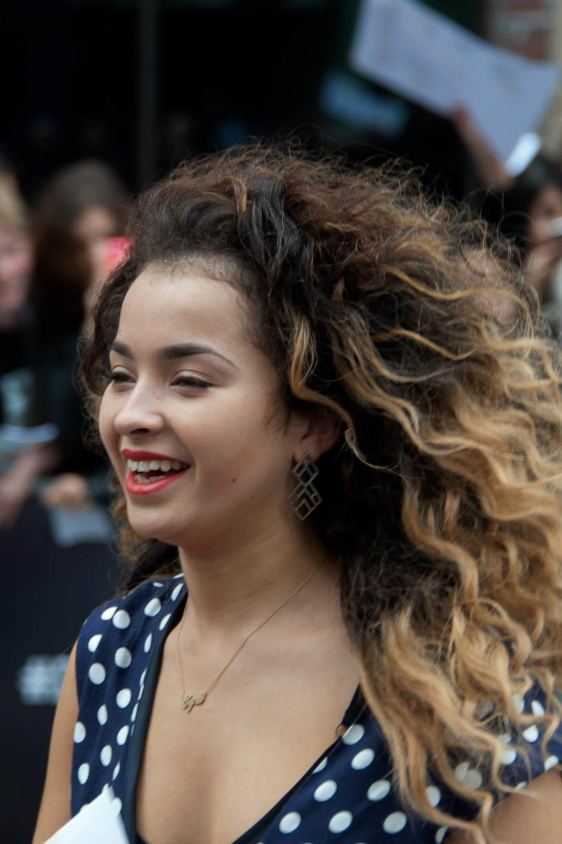 Ella Eyre in 2014.